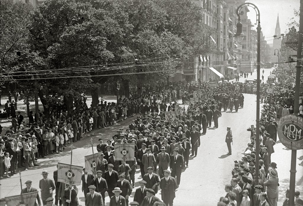 Título original: Recibimiento al general Miguel Primo de Rivera en el Ayuntamiento de San Sebastián (6/6) Localización: San Sebastián (Guipúzcoa)